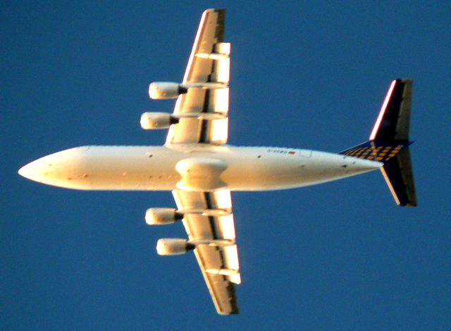 BAe 146 over Friedrichshafen, Germany